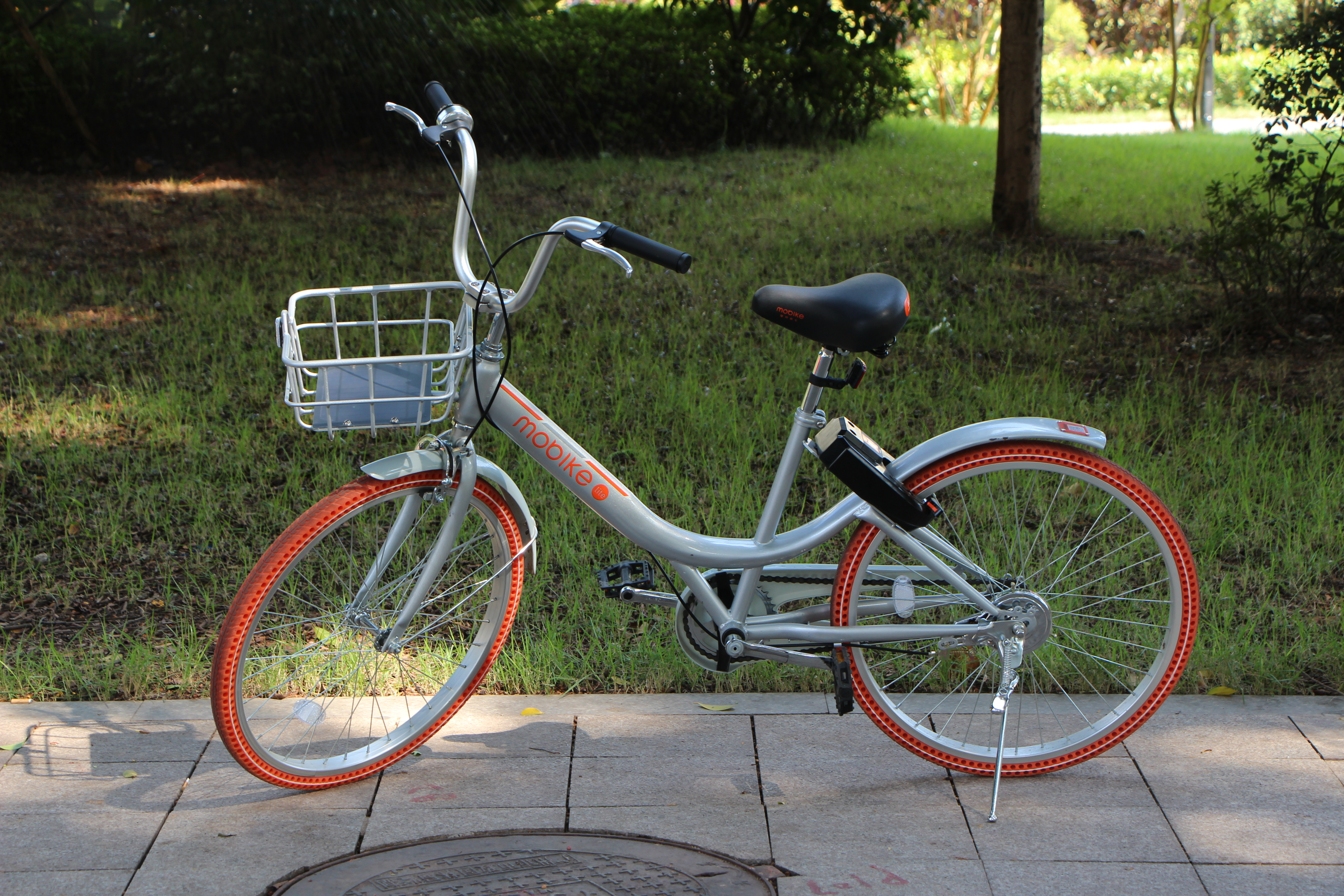 摩拜单车Lite版